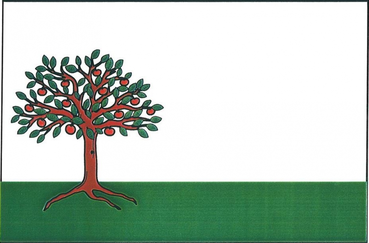 vlajka, Jabloňov, okres Žďár nad Sázavou